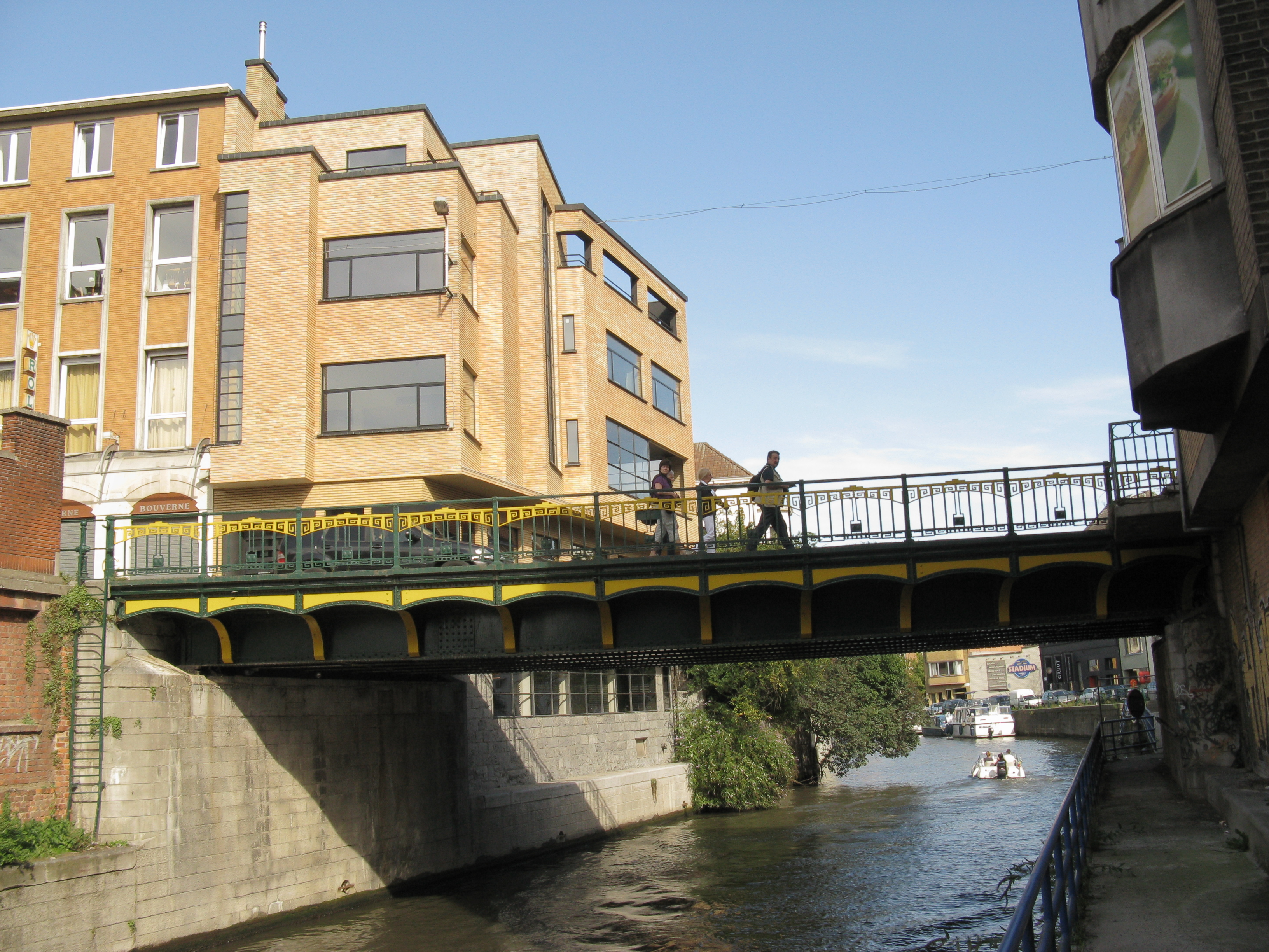 Boot aan de brug over de Ketelvest aan de Korte Dagsteeg in Gent, België.